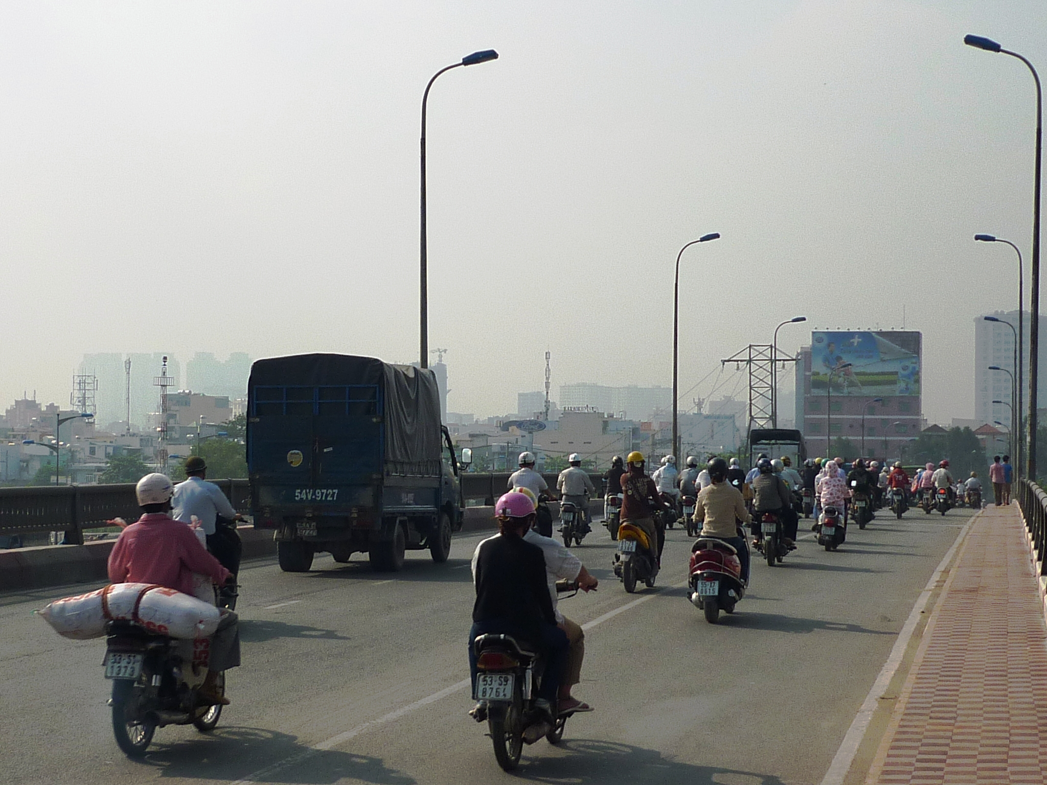 Cầu Bình Triệu 2 hướng từ quận Thủ Đức về quận Bình Thạnh